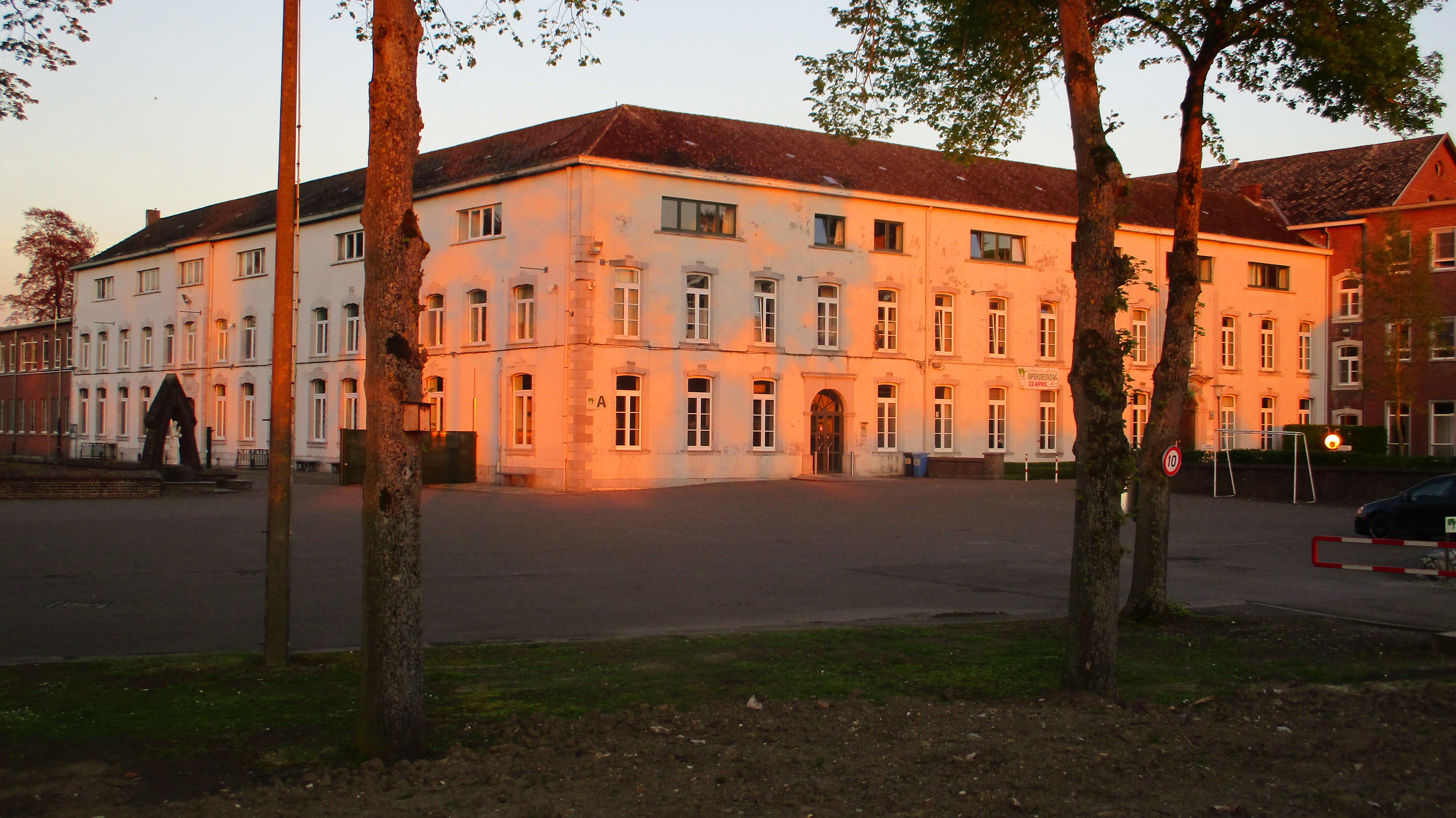 Bogaardenkloosten in Zepperen. SOLV school